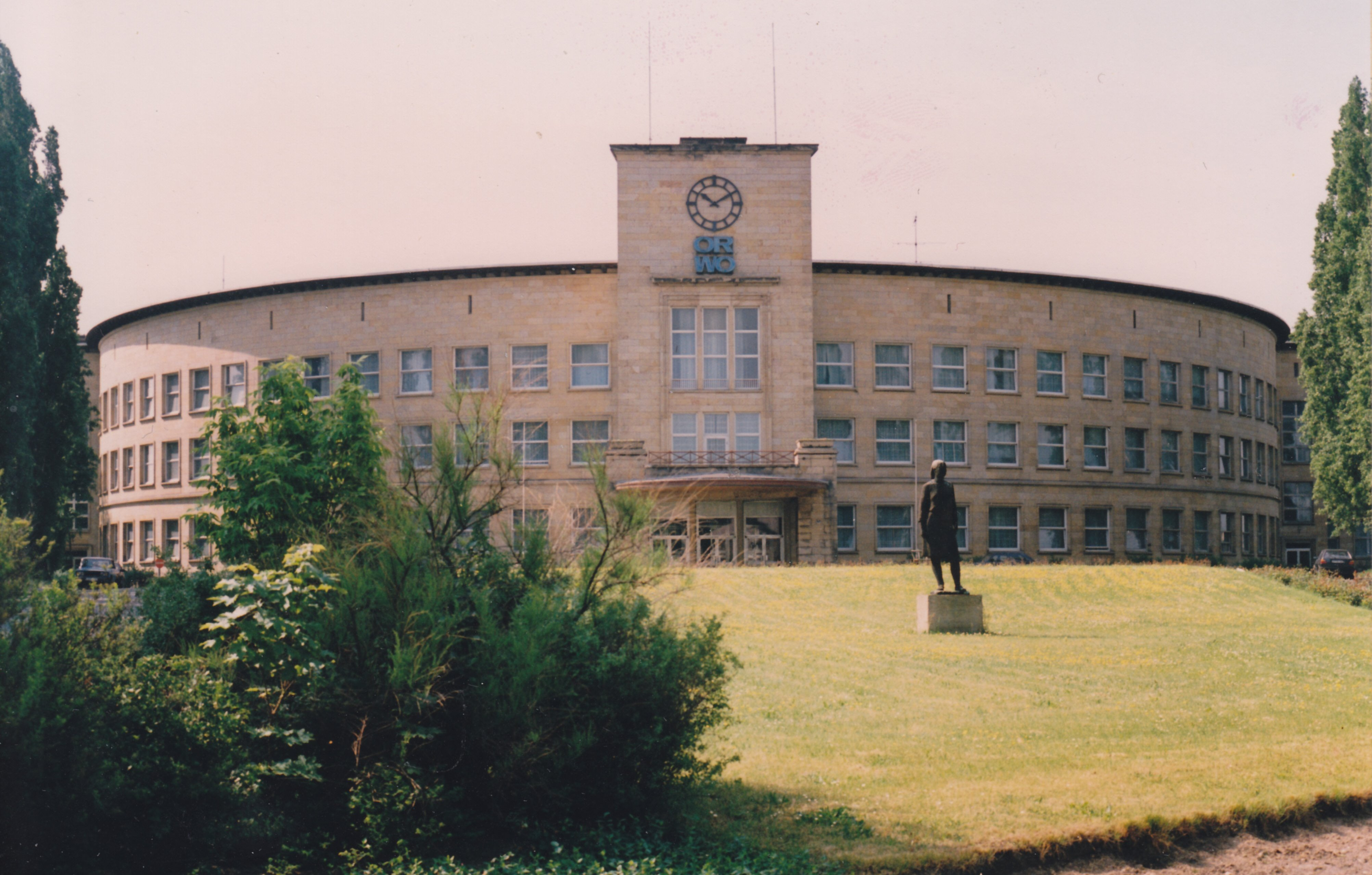 Das 1936/37 erbaute Verwaltungsgebäude der Filmfabrik Wolfen im Jahr 1992. Heute ist es das Rathaus von Bitterfeld-Wolfen